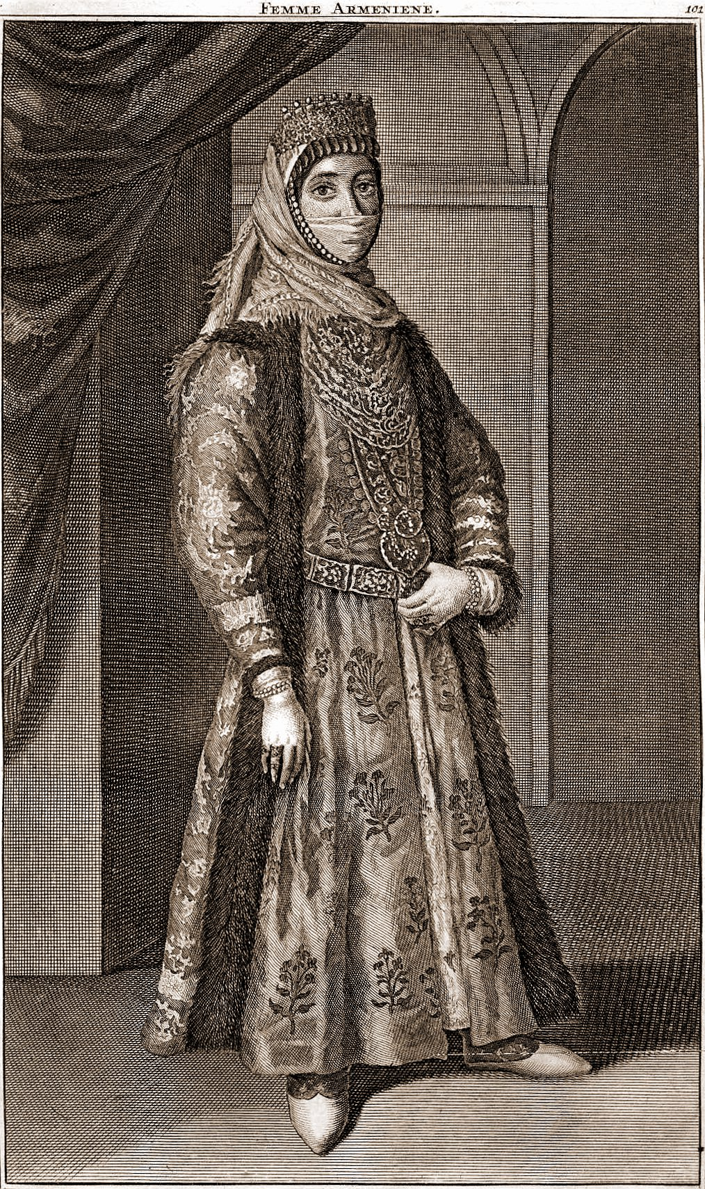 Армянская женщина